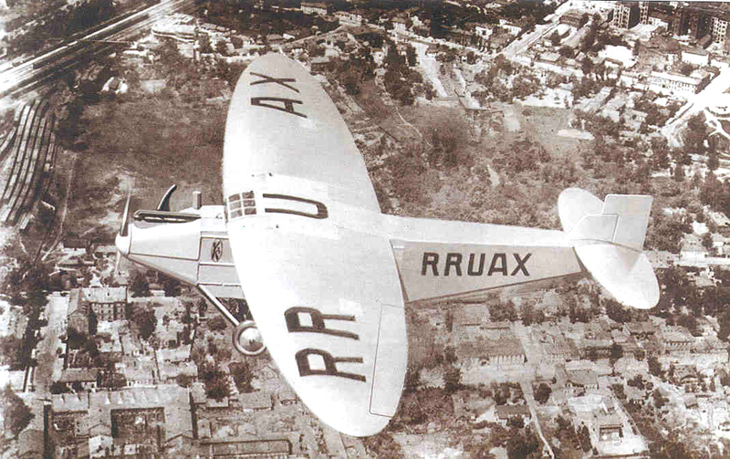 Советский 5-местный пассажирский самолет К-4 авиаконструктора Калинина производства Харьковского авиазавода над Харьковом (район Левада). 1928 год. (Первый серийный самолёт завода). Также этой фотографии посвящено целое расследование: [1]